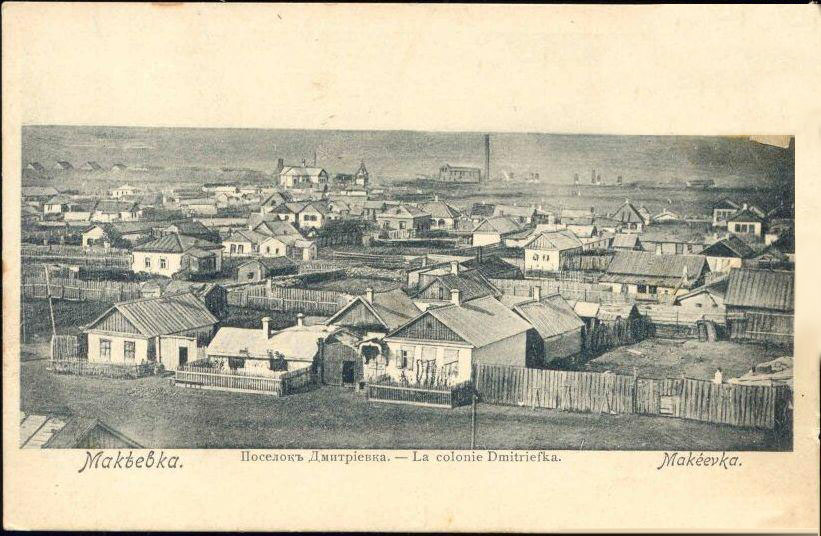 Посёлок Дмитриевка